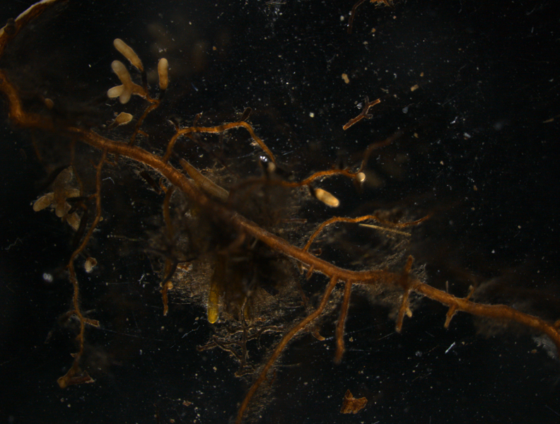 Mykorrhiza an Feinwurzelsystem (Buche).